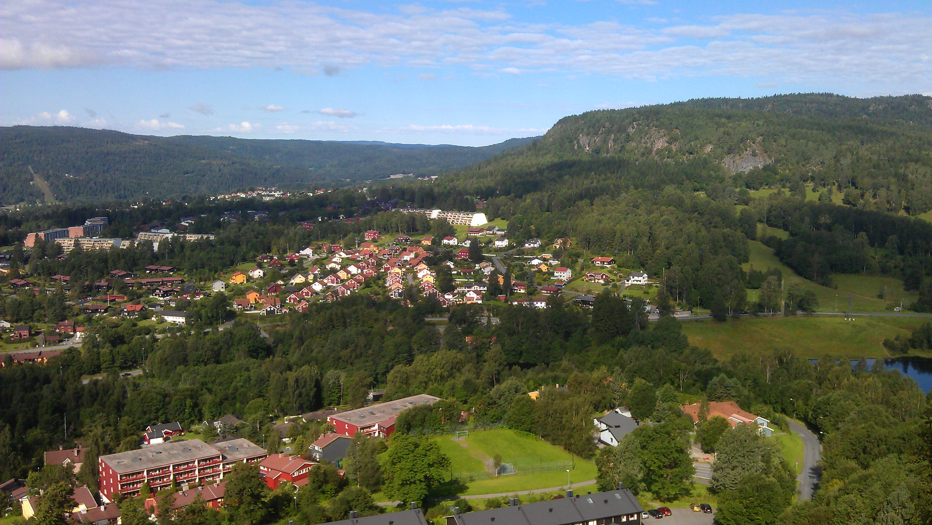 Eineåsen og Rykkinn i Bærum